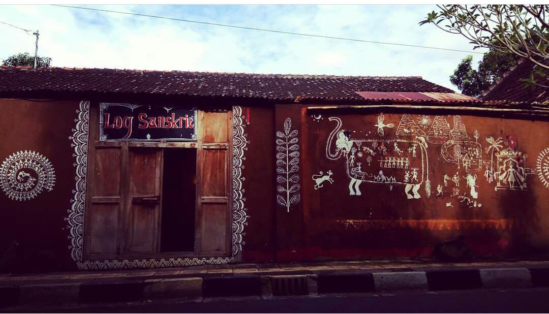 ashram Logsanskrit di Yogyakarta